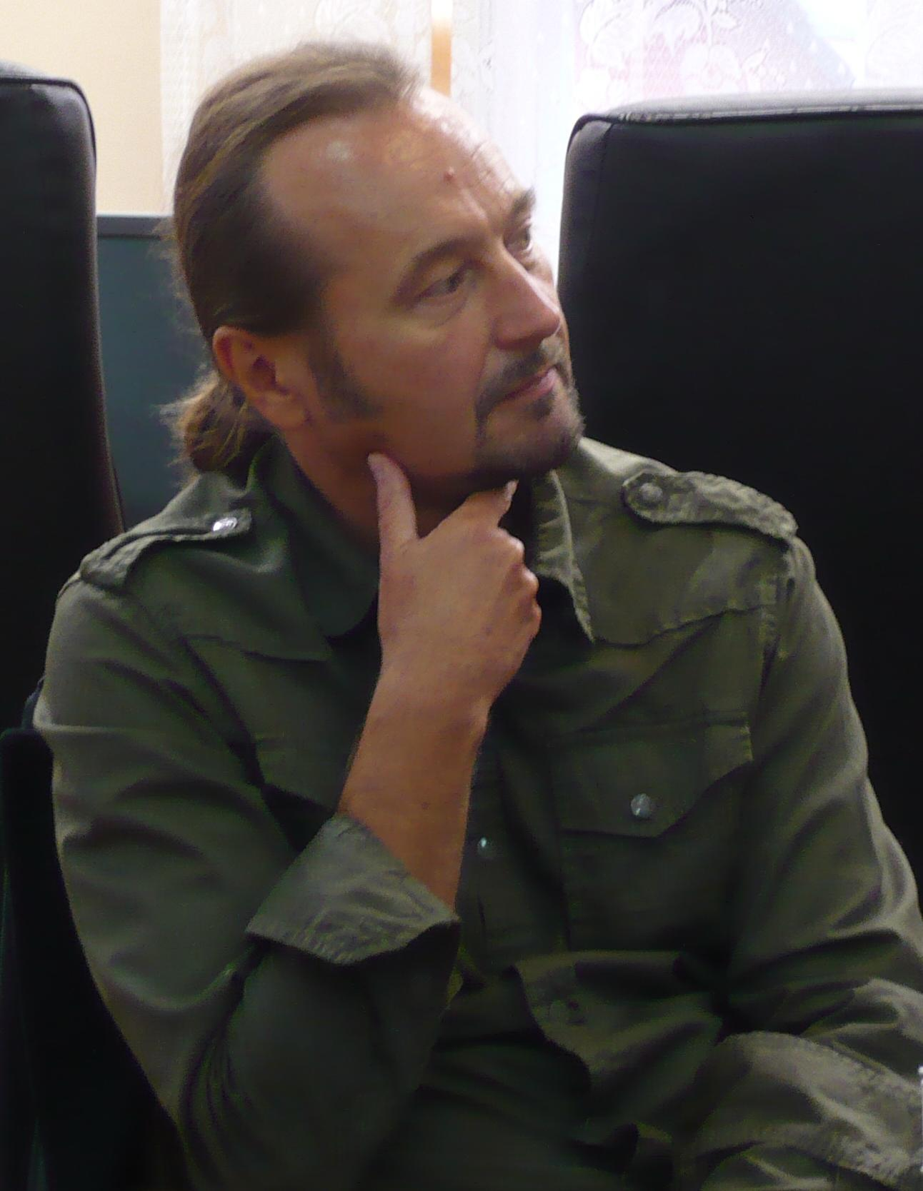 Jacek Bierut